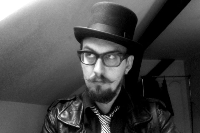 Taavi Varm